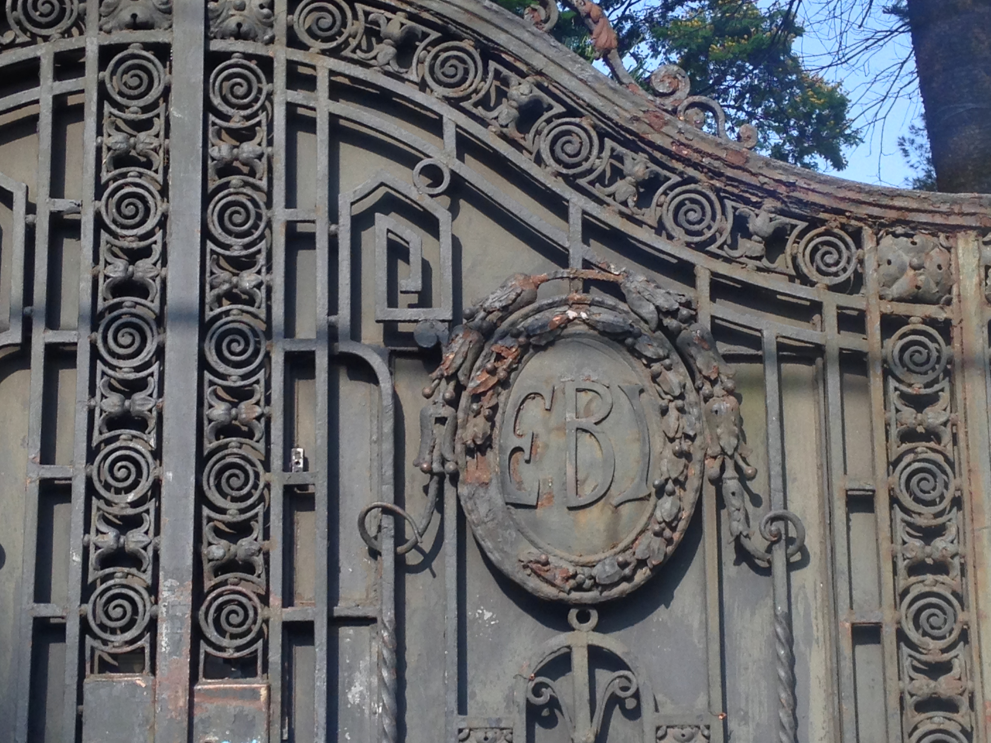 Detalhe do brasão no portão da Residência da Família Jafet, na Rua Bom Pastor, 825, em São Paulo (SP), Brasil.